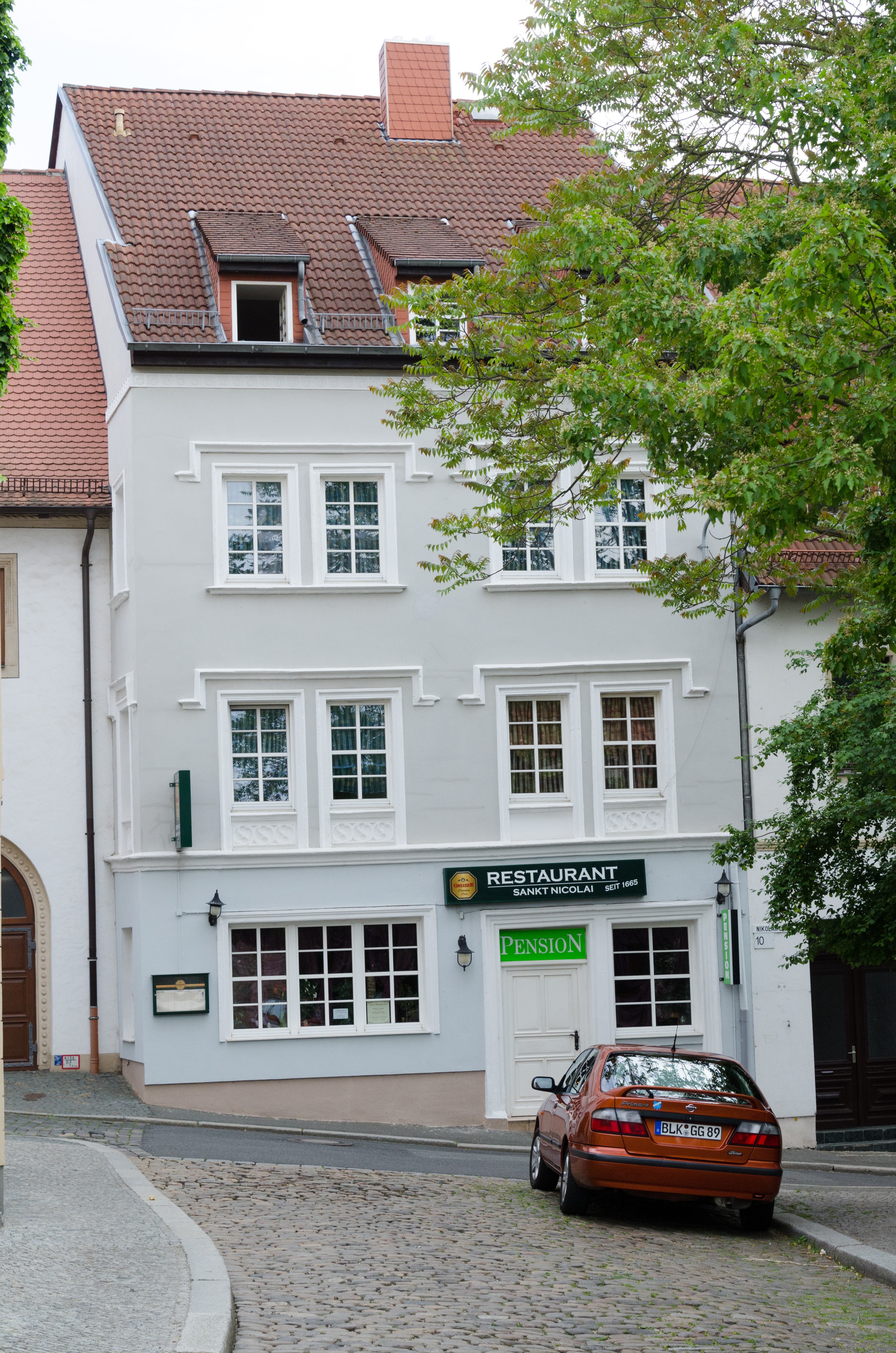 Zeitz, Nicolaiplatz 11